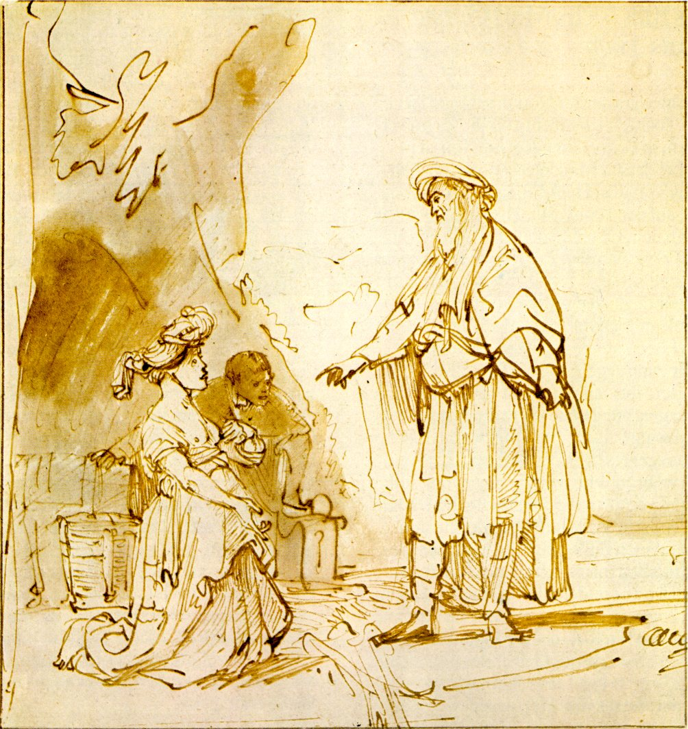 Rembrandt, Boas und Ruth, Feder- und Pinselzeichnung, 17,8 x 16,9 cm, um 1637-40. Berlin, Kupferstichkabinett der Staatlichen Museen